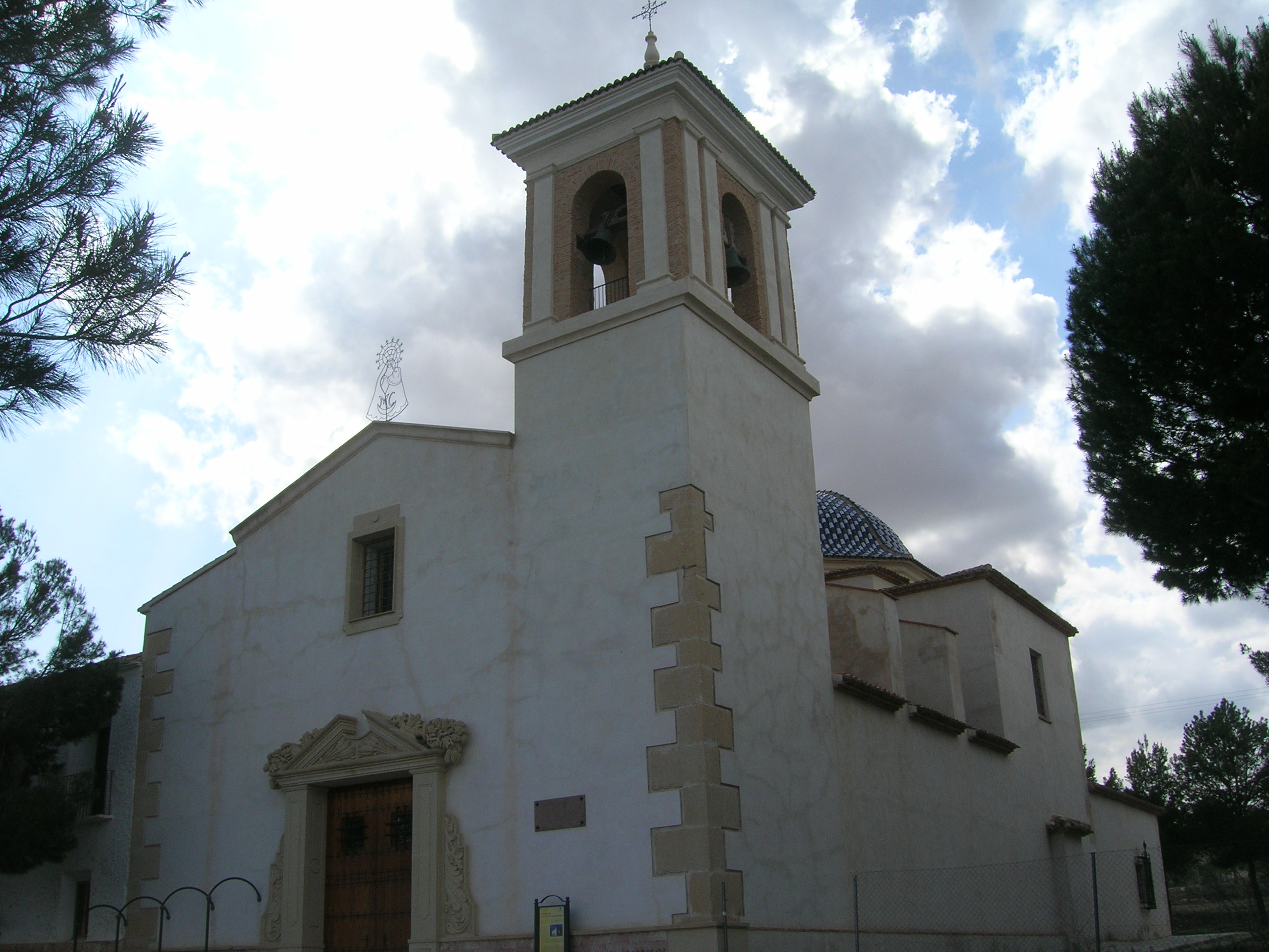 Santuario de Nuestra Señora de la Consolación, en Montealegre del Castillo, Albacete, España.